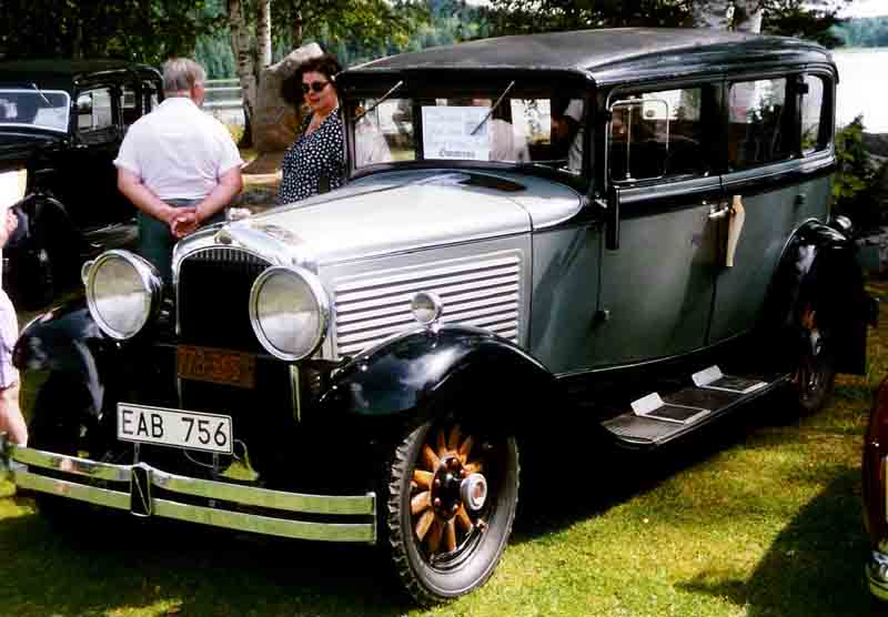 Marmon Series 8-69 4-Door Sedan 1929